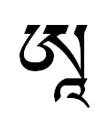 али кали а